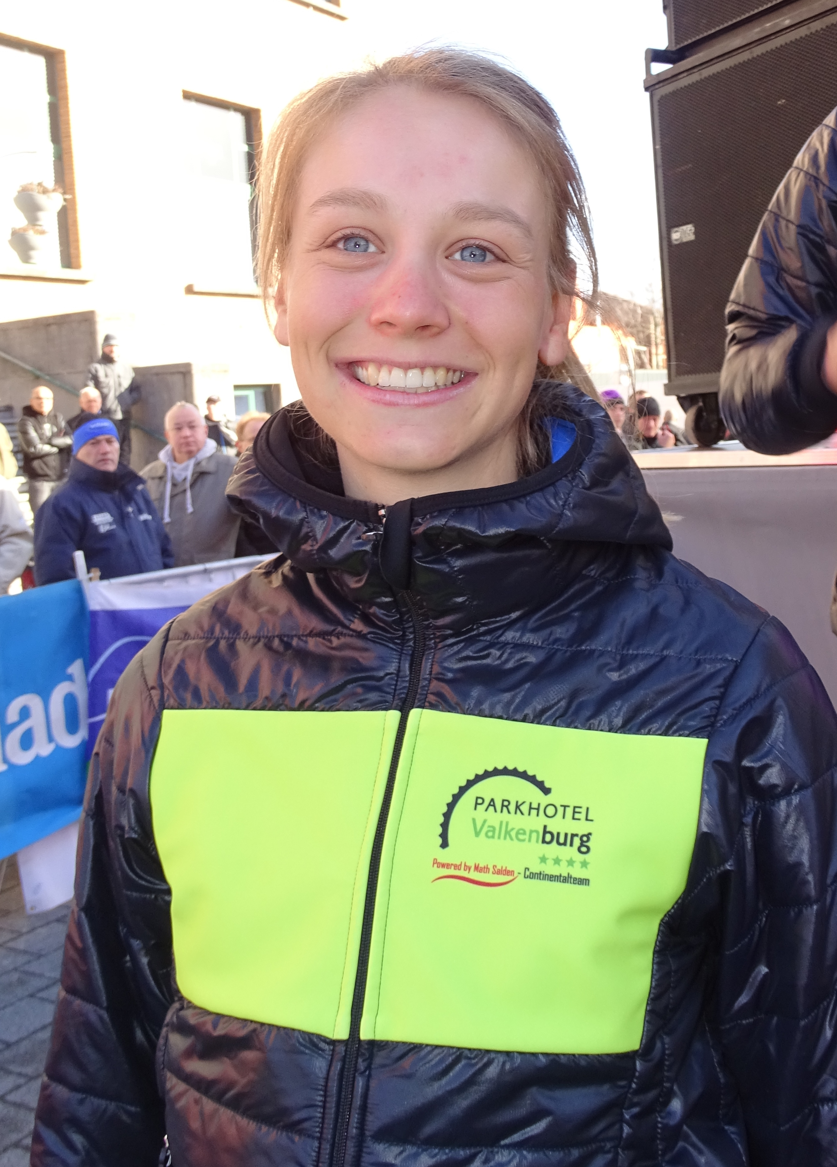 Reportage réalisé le mercredi 2 mars à l'occasion du départ du Samyn des Dames 2016 et du Samyn 2016 à Quaregnon, Belgique.